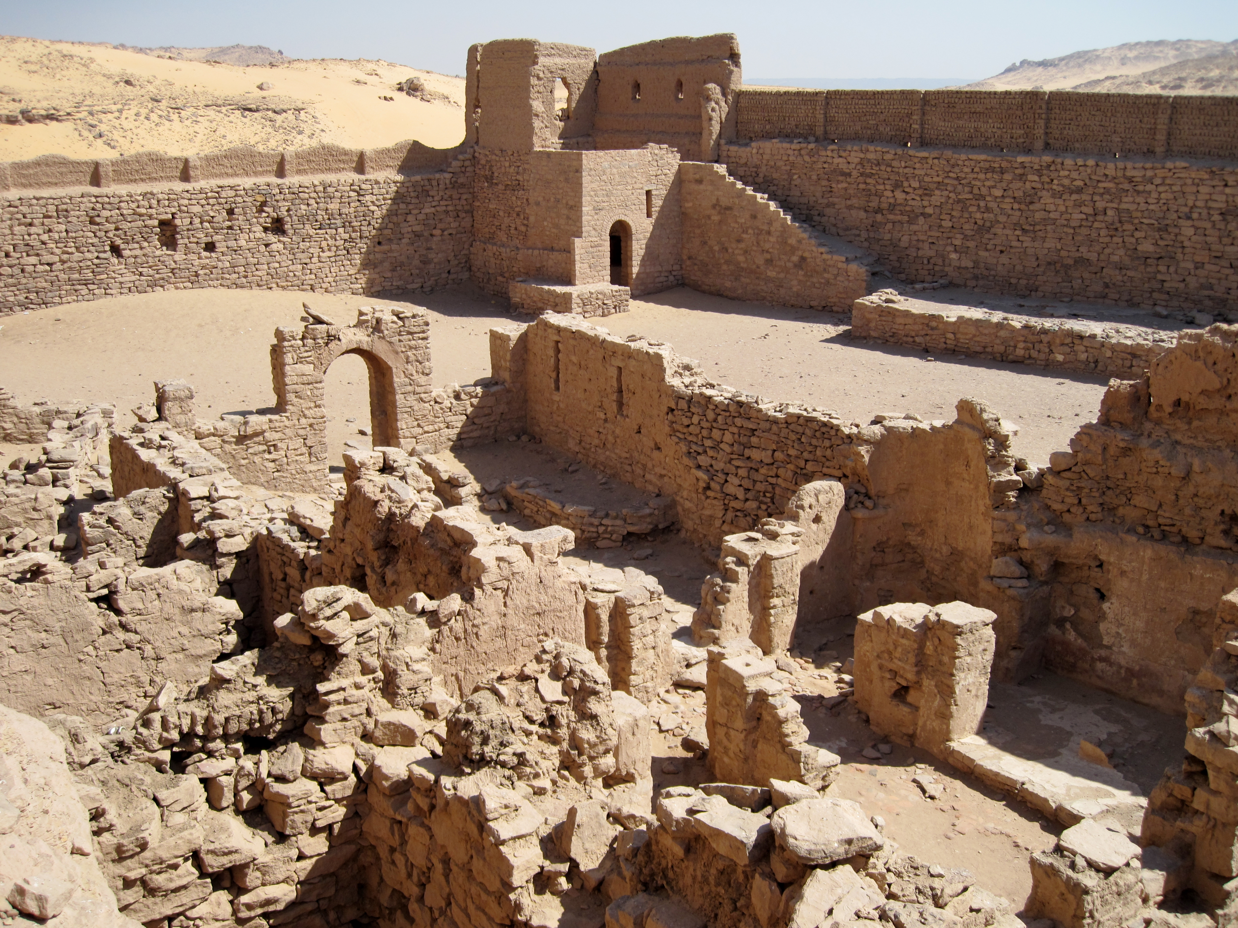 Untere Ebene des Simeonsklosters (Deir Amba Samaan) mit nordöstlichem Eckturm der Außenmauer westlich des Nils in Assuan, Ägypten